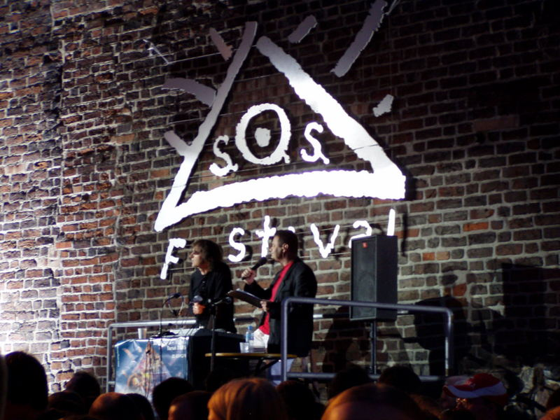 logo SoS na scianie muru podczas festiwalu